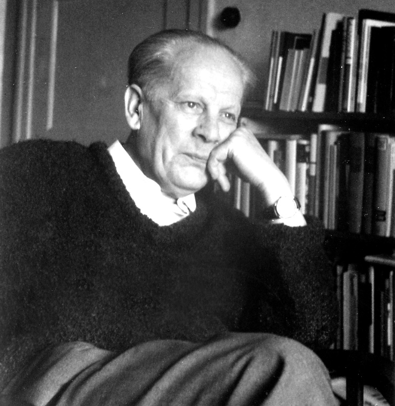 Artur Ploog in seiner Wohnung